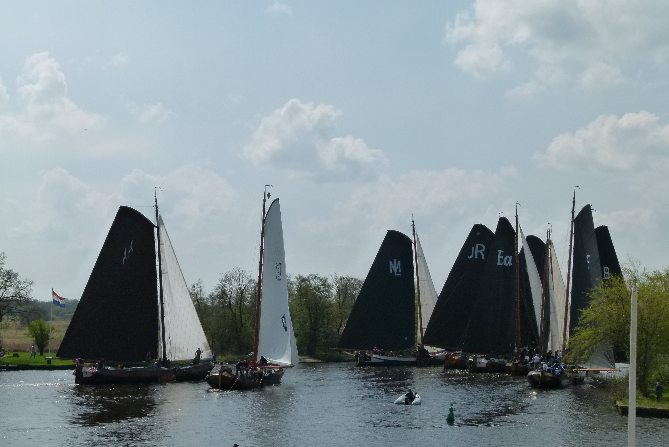 Skûtsjes Earnewâld